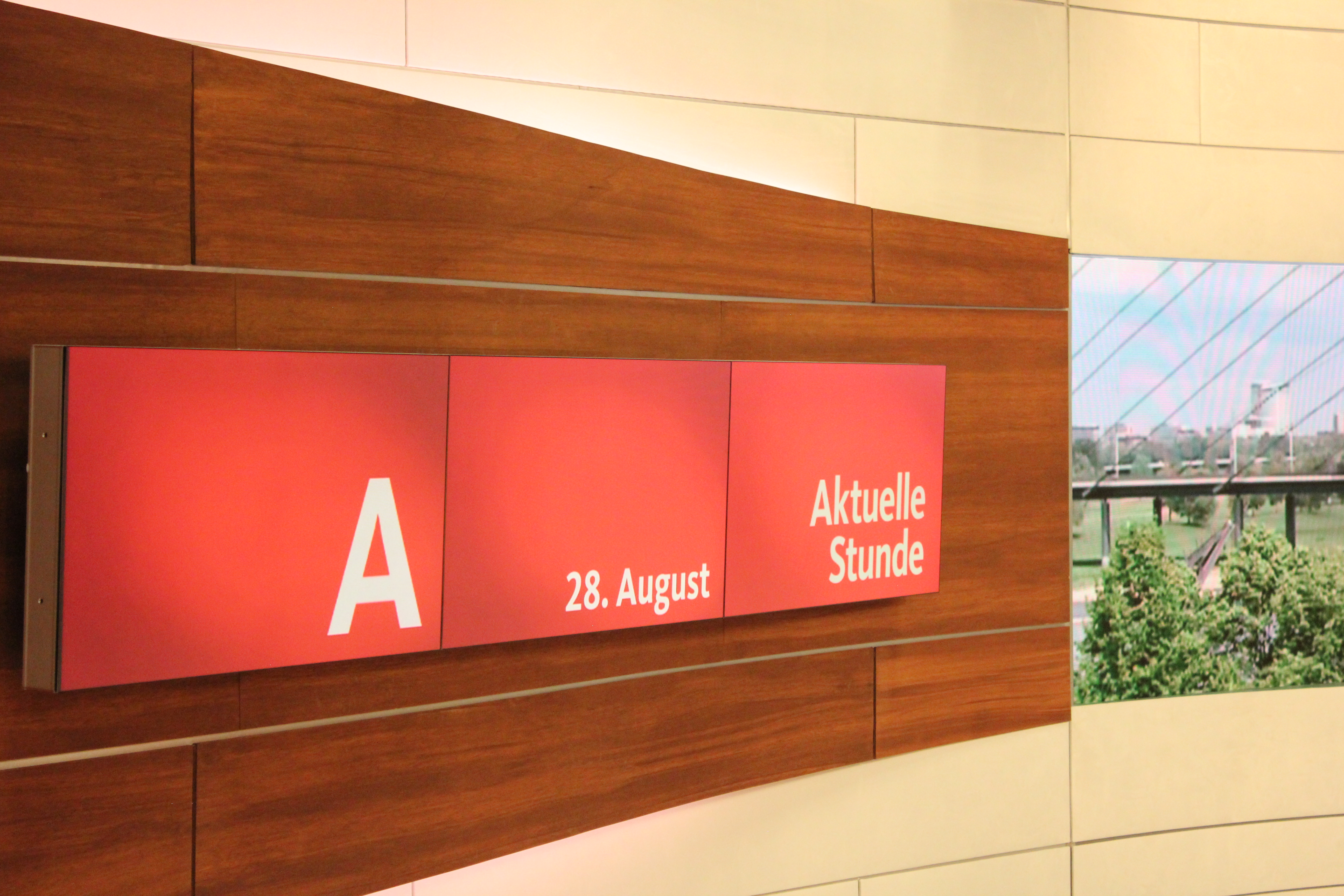 Man sieht das Aks, WDR aktuell und WDR extra Studio das bis September 2016 im Einsatz war. Links die Monitorwand und rechts im Hintergrund die Panorama LED-Wand die das Düsseldorfer Stadtbild zeigt.